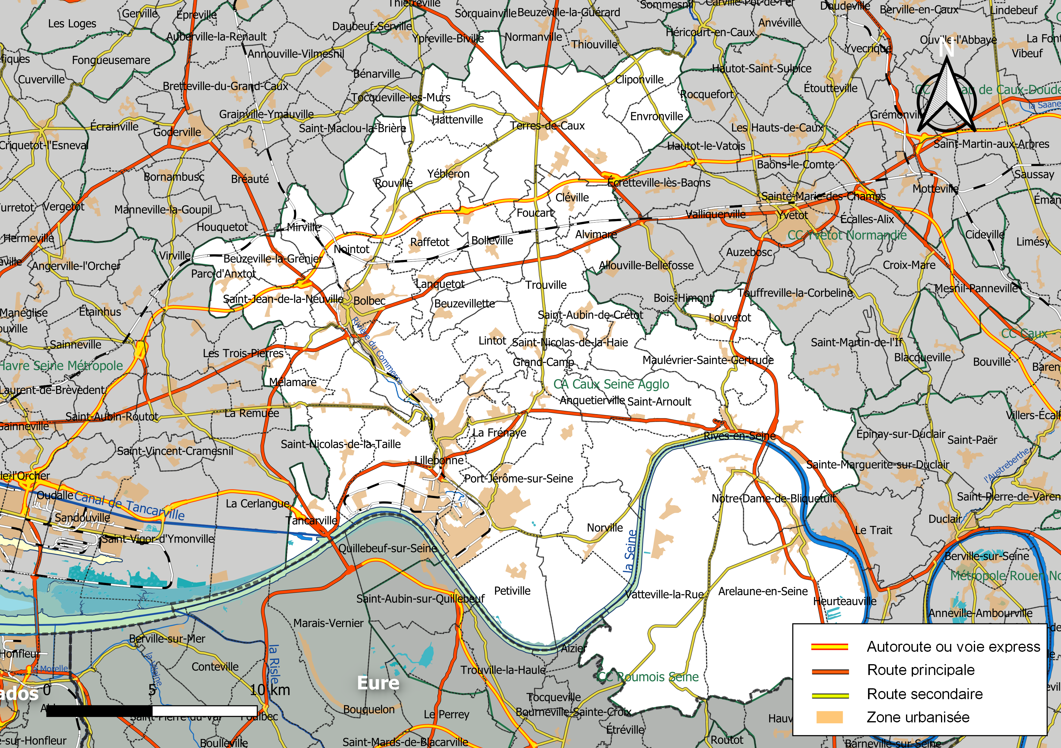 Carte géographique de l'intercommunalité Caux Seine Agglo, département de la Seine-Maritime, France. Composition au 1er janvier 2019.